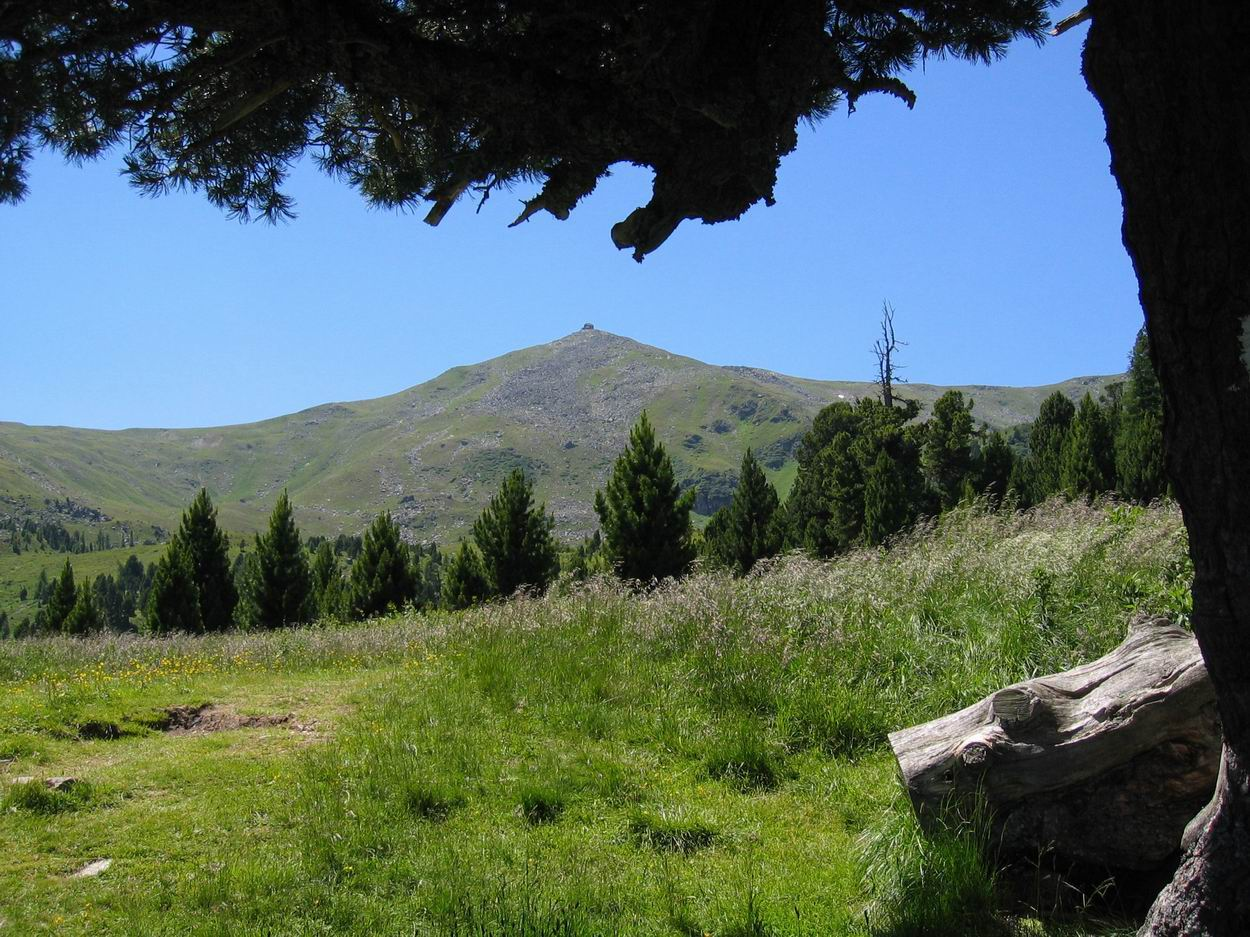 Zirbitzkogel mit Schutzhaus